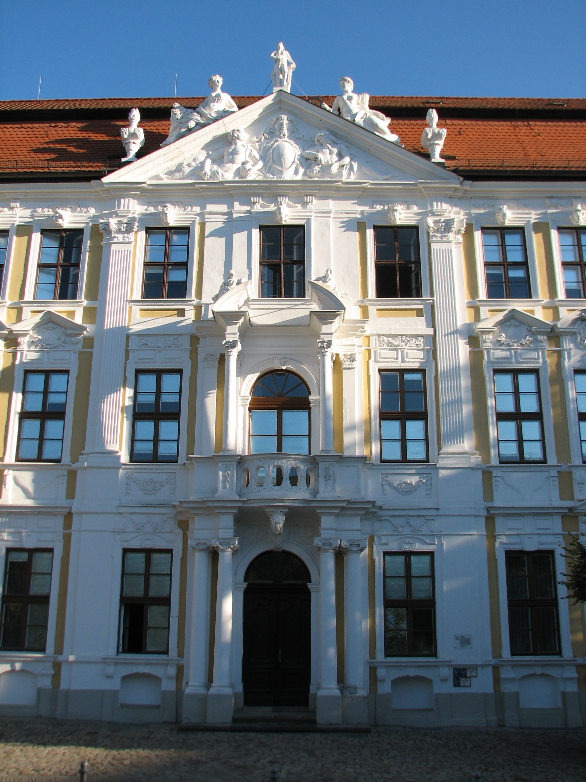 Domplatz 7